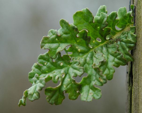 Jakobskruiskruid (of: Jakobskruid) (Jacobaea vulgaris subsp. vulgaris syn. Senecio jacobaea L.). Detail van het blad. Deze foto werd genomen door gebruiker Falka. Ze maakte deze foto in het westerpark in Amsterdam.